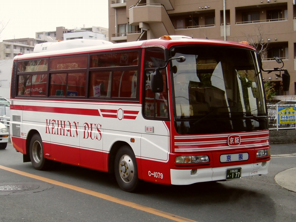 Mitsubishi Aeromidi MJ KK-MJ26HF for Keihan-Bus,use for Osaka-Denkitsushin-Daigaku operating